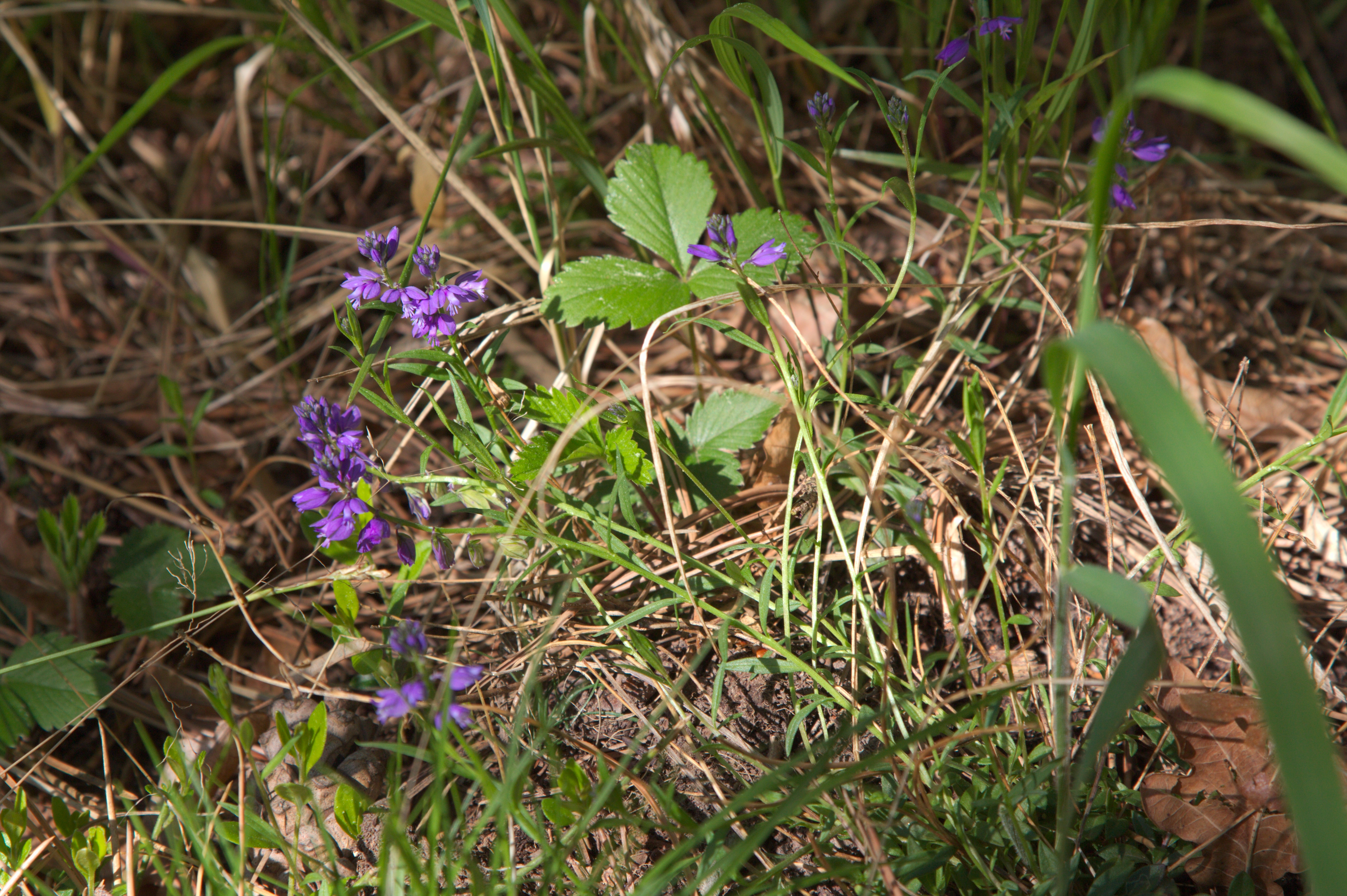 Malý a Velký Štít (národní přírodní rezervace) - Polygala vulgaris L., vítod obecný - status ohrožení v ČR: není